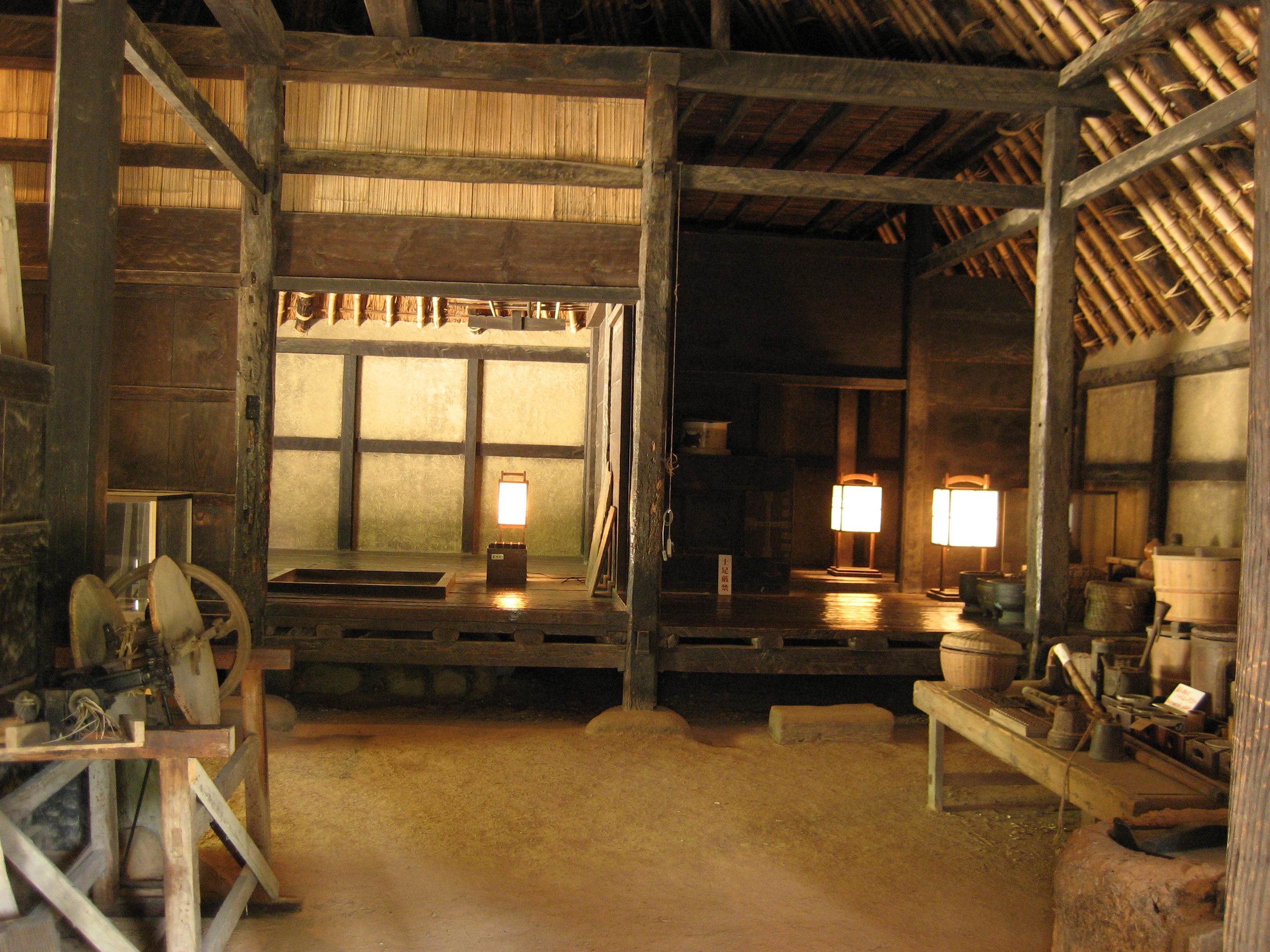 箱木家住宅母屋内部。「にわ」から「おもて」「だいどこ」方向。taken by Azuncha.